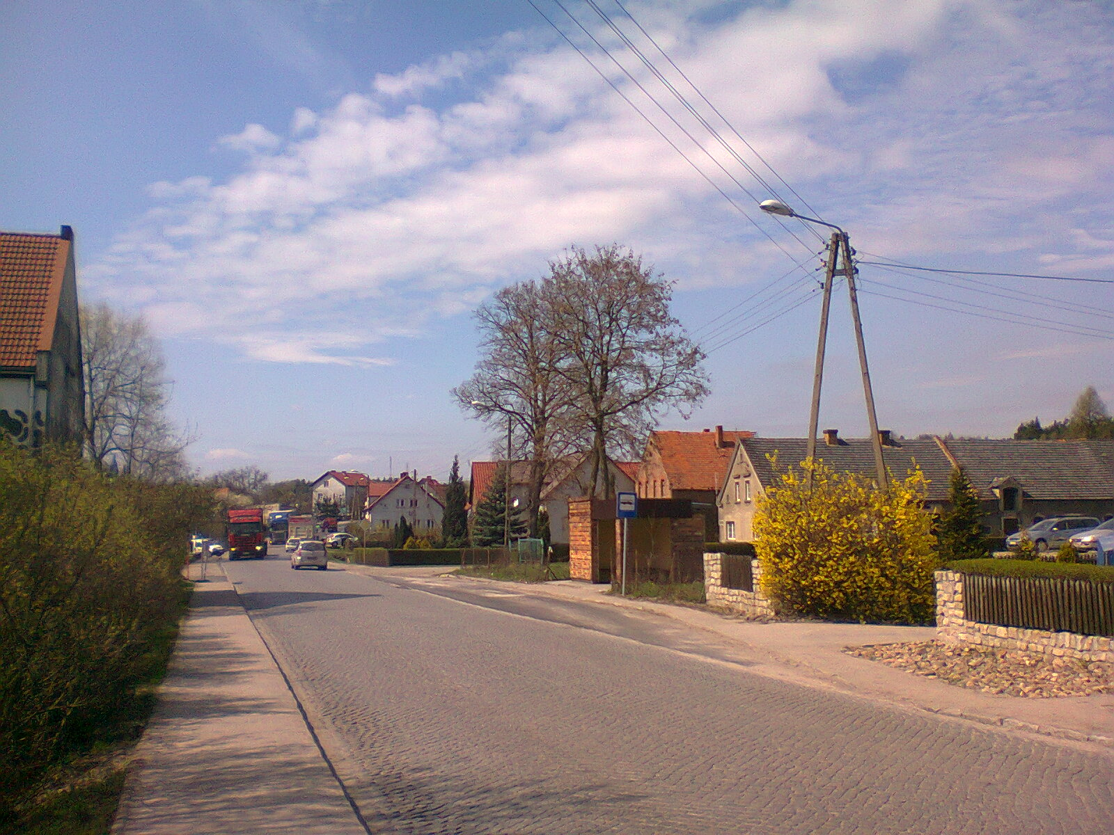 Marszów ul. Leśna